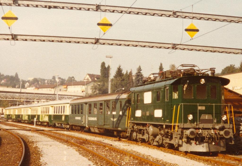 Ausstellungszug “75 Jahre Bodensee-Toggenburg-Bahn und Rickenbahn” mit Be 4/4 11 in St. Gallen-St. Fiden